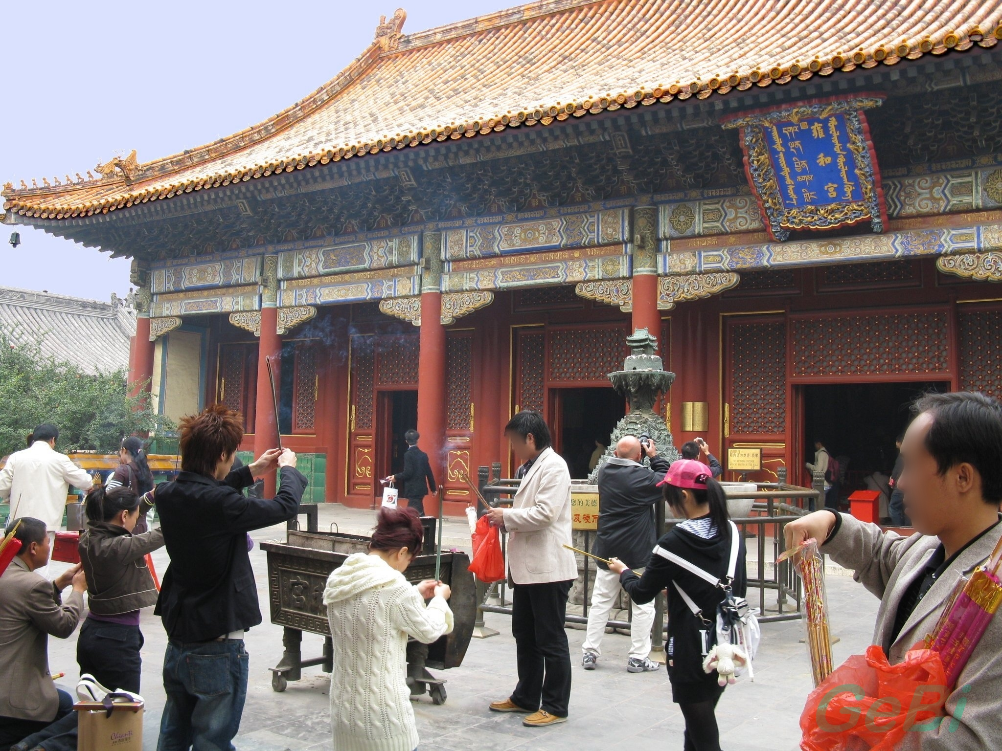 Vorplatz der "Yonghe Gong-Halle" der Tempelanlage Yonghe Gong ( 'Lamakloster') in Peking